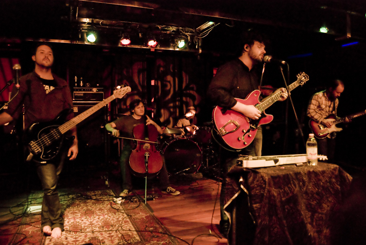 dredg @ zoe club